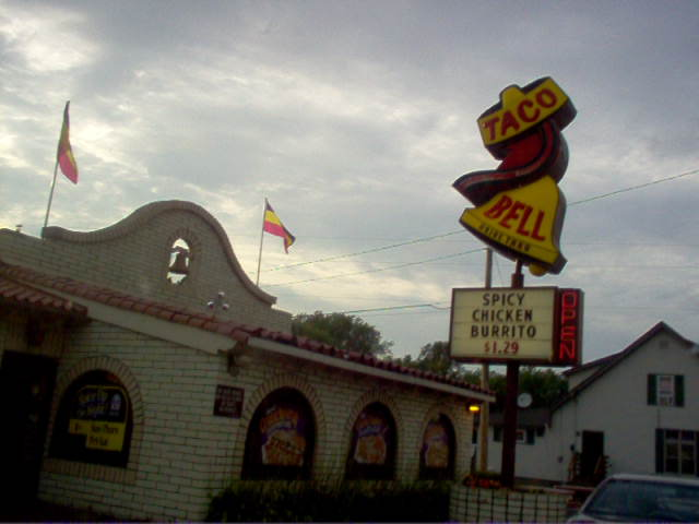 The original Taco Bell design.